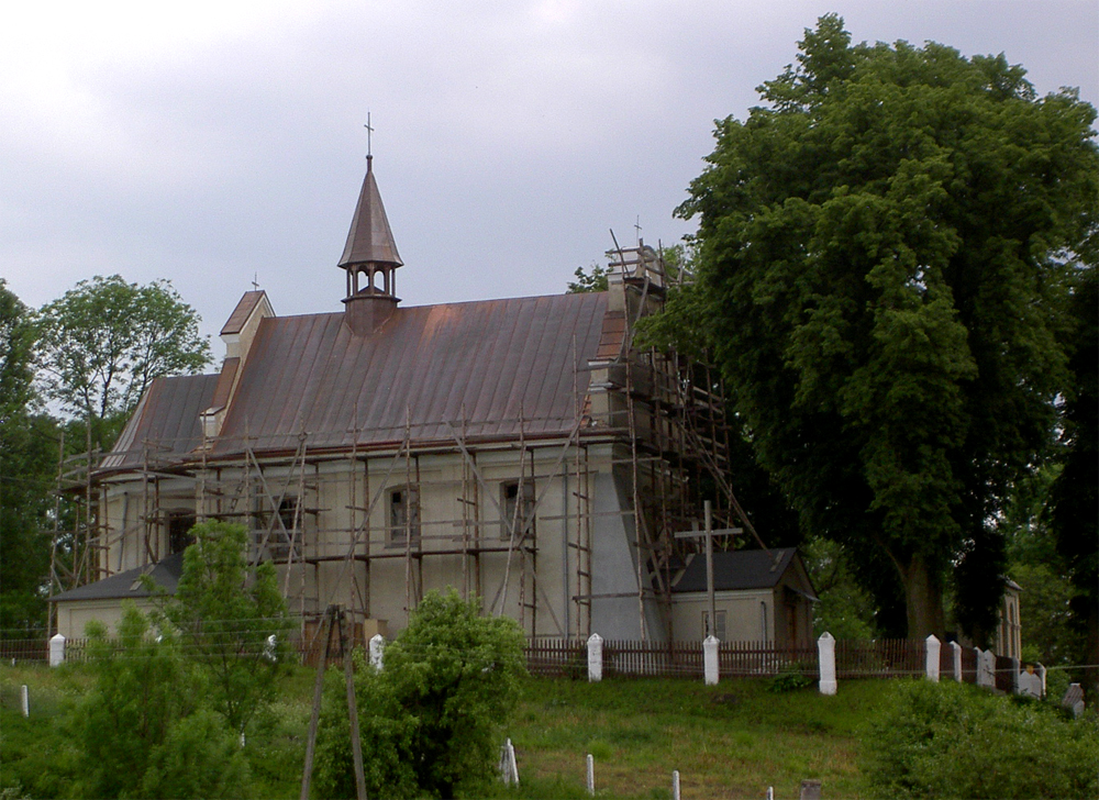 Żniatyn, Poland • Kościół / Church